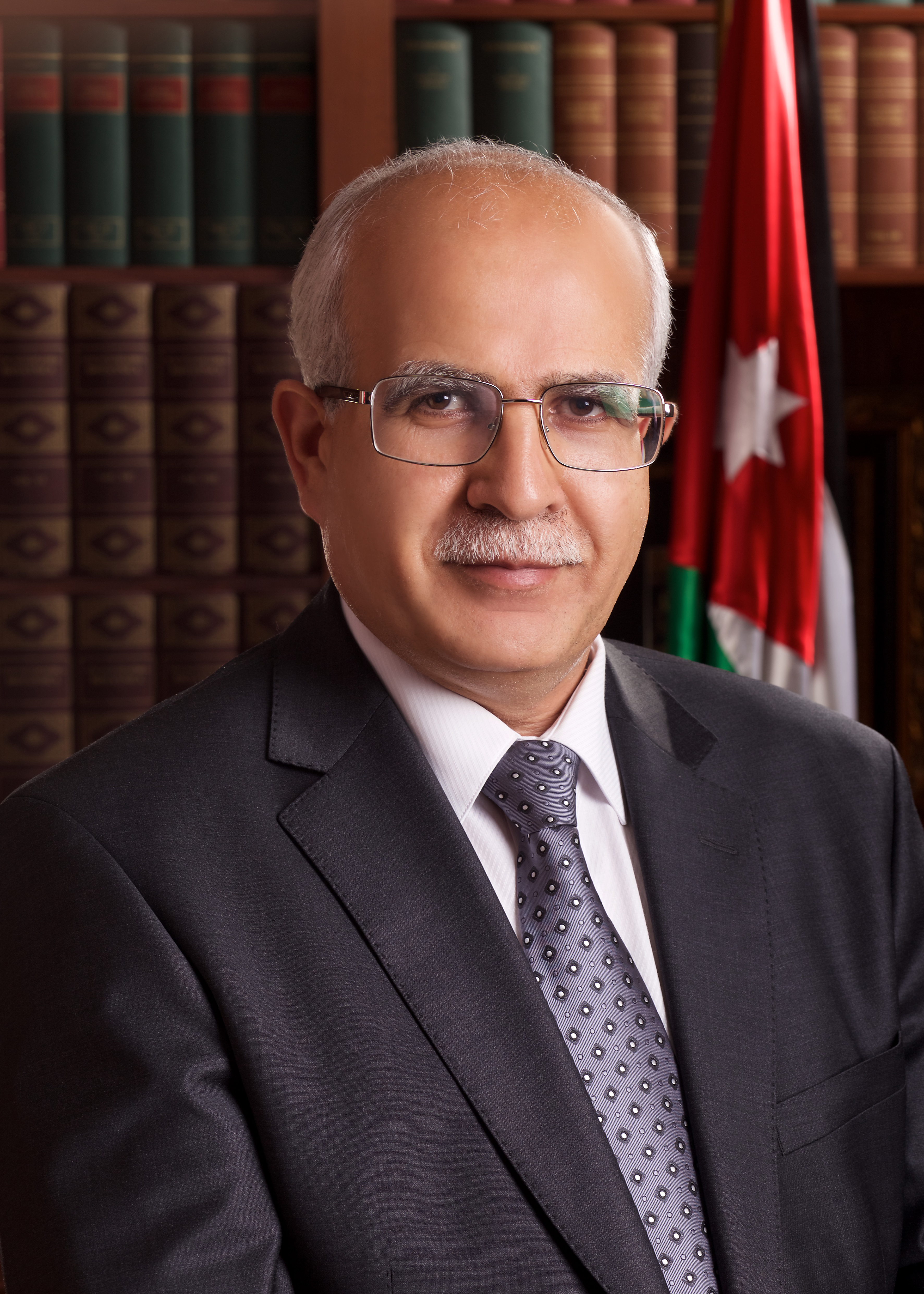 صورة للأستاذ الدكتور شاهر المومني